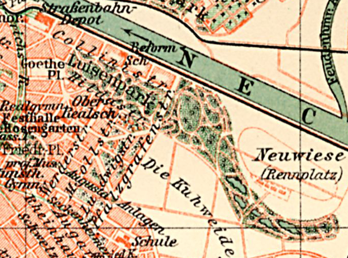 Stadtplan Mannheim-Oststadt und Luisenpark